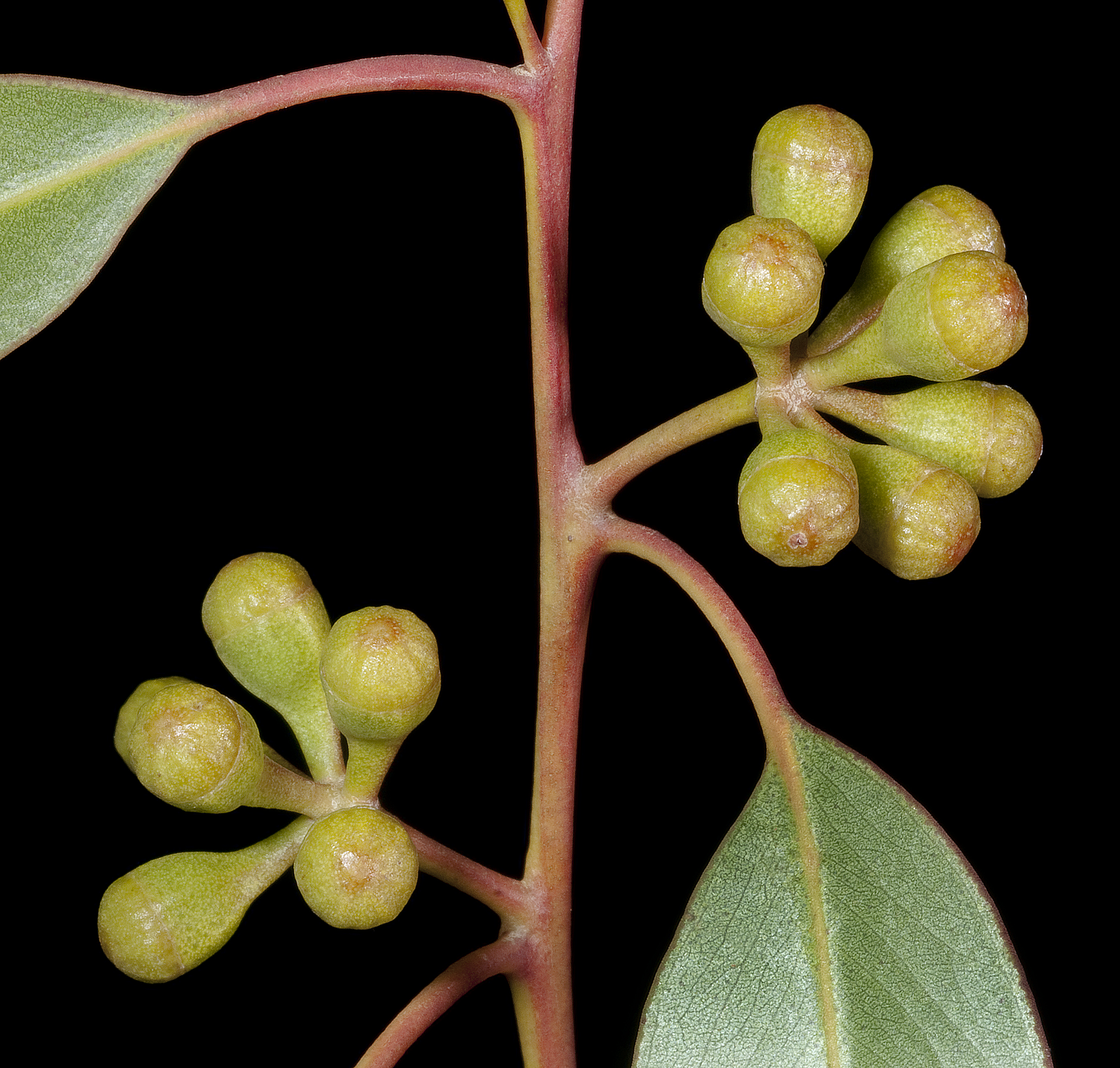 KRT3970